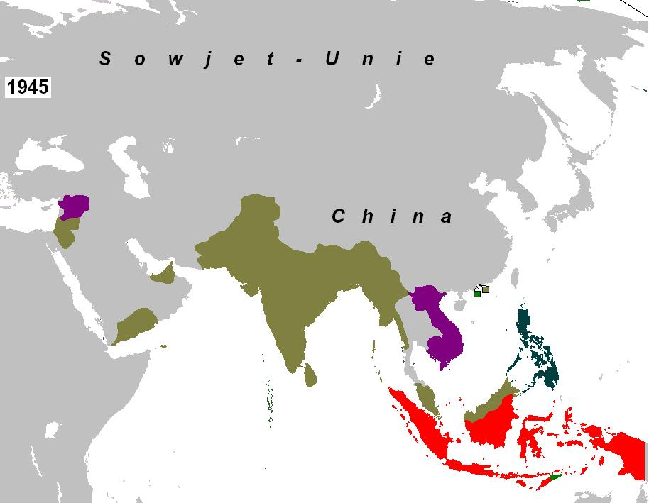 Kolonisasies in 1945 Asië